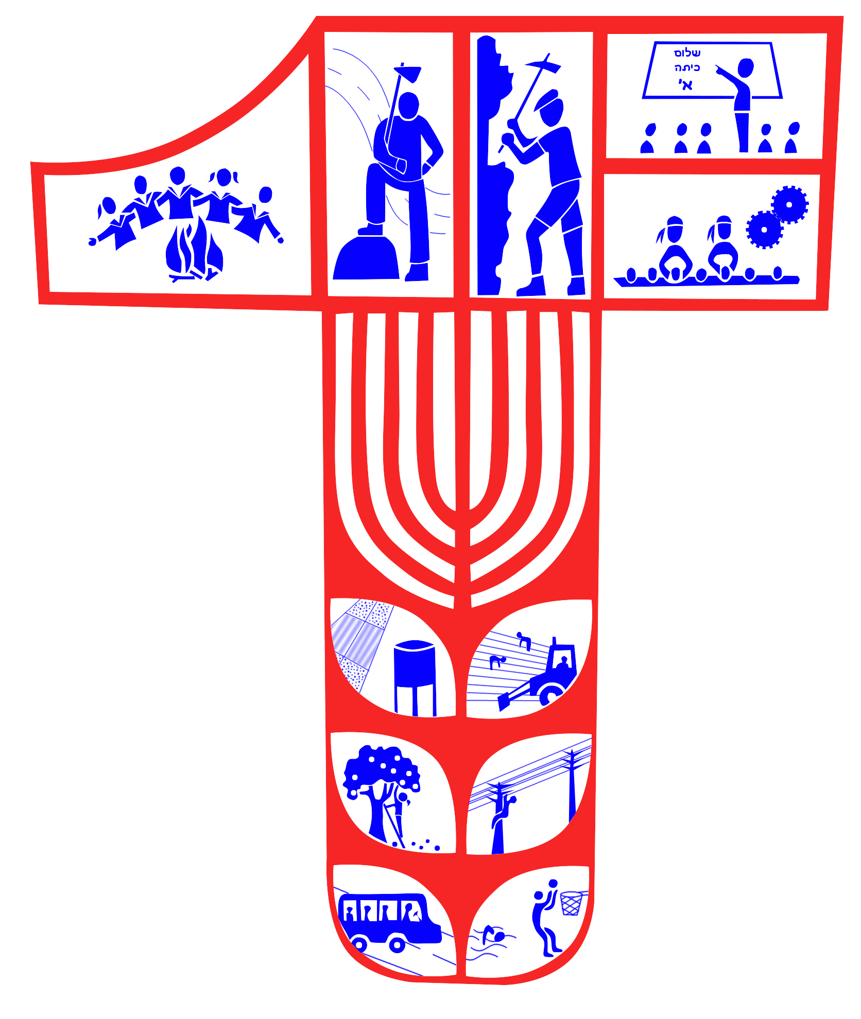 דיגיטלציה של ציור קיר ממרכז הסמינרים של הנוער העובד והלומד ברביד. מפעלי תנועת העבודה הישראלית בתוך סמל ההסתדרות הישן